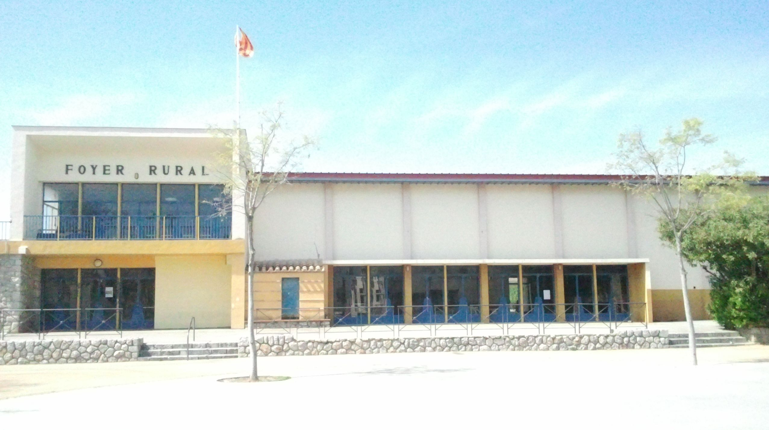 Le foyer rural de Saint-Nazaire